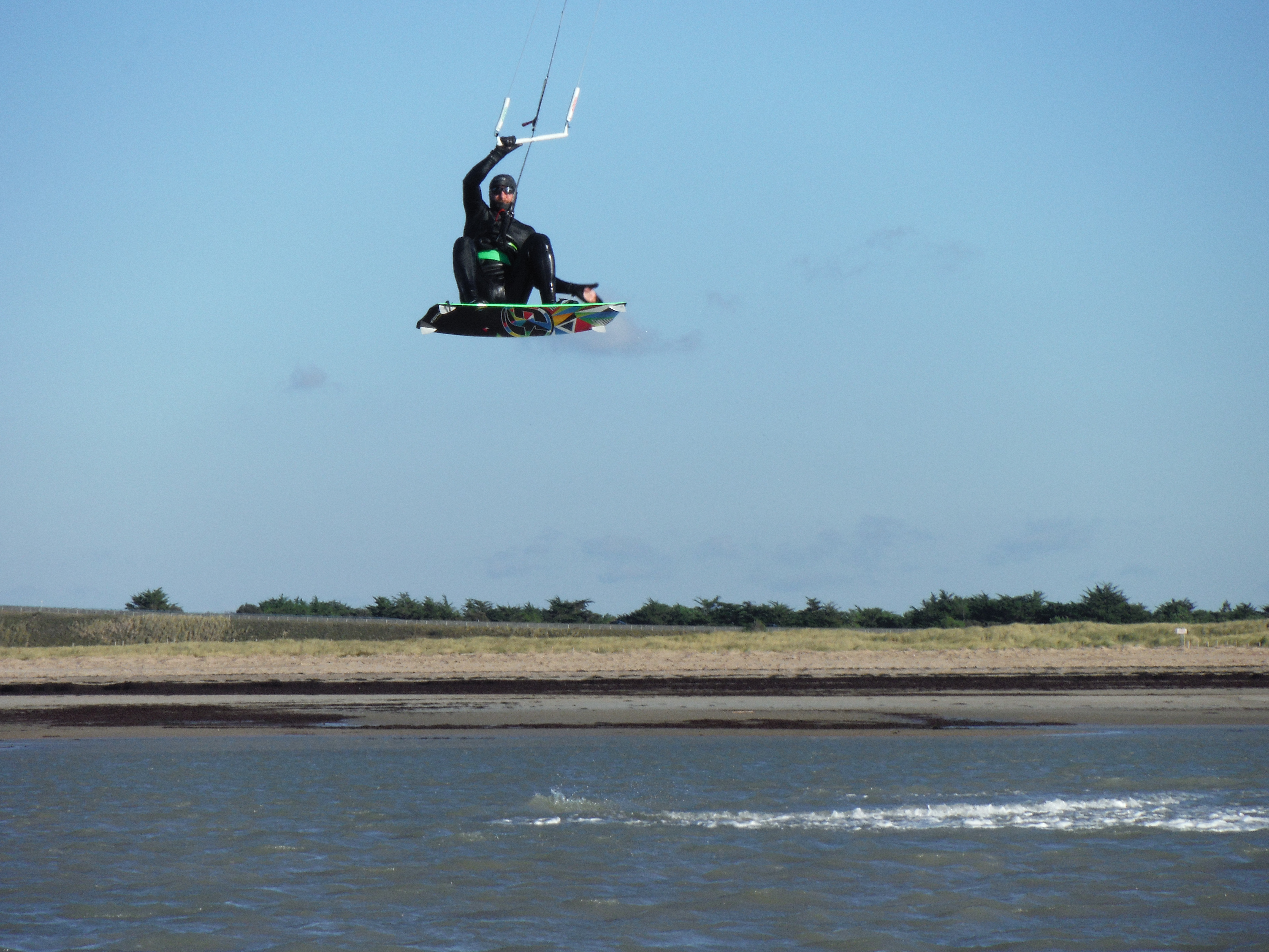 saut en kitesurf avec un grab sur le tail